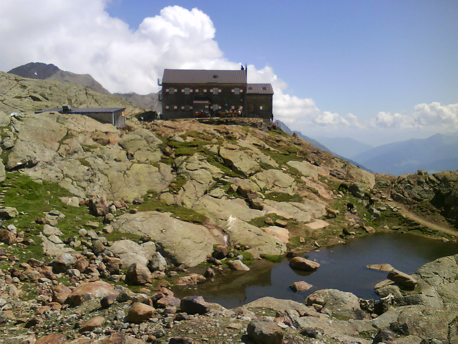 Teplitzer Hütte 9 Day 2